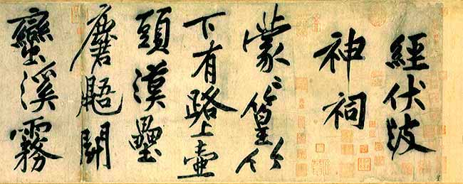 [宋] 黄庭坚 《伏波神祠诗卷》（局部）纸本墨迹 来自